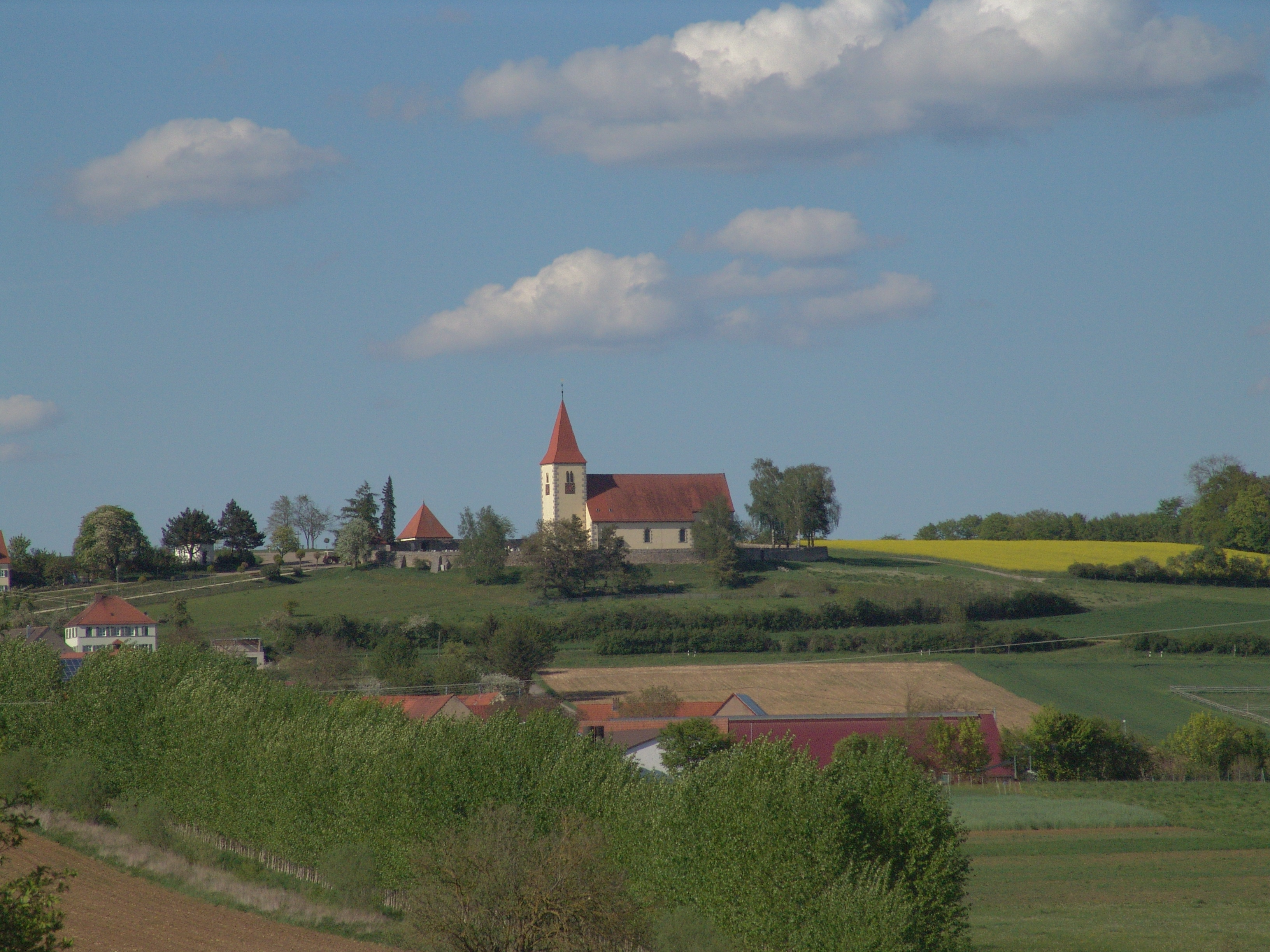 Simultankirche St. Stephanus in Ehingen am Ries